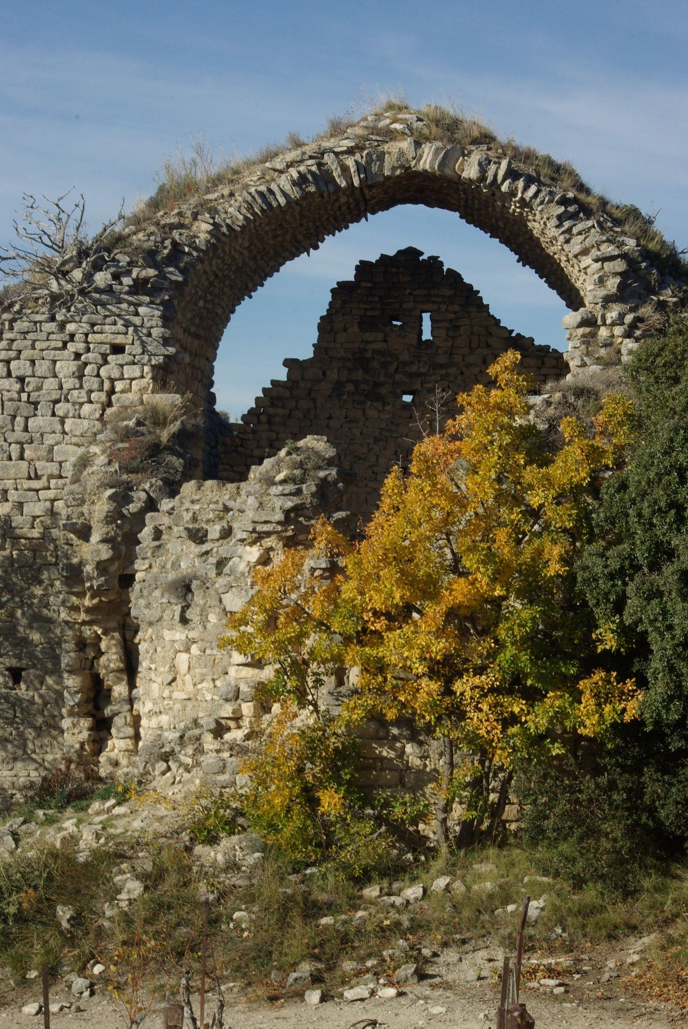 Chapelle Saint-Hilaire en ruines à Beaumes-de-Venise